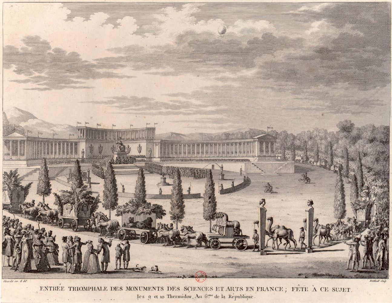 Ingresso a Parigi del convoglio di opere d'arte rubate da Napoleone (Auber 1802: vol. 3, pl. 136). Auber J. B. D. (éd.) 1802. — Collection complète des tableaux historiques de la Révolution française, tome 2. Pierre Didot l’aîné, Paris, [i]-[iv] + 273-424, 1 frontispice, pls 69-144